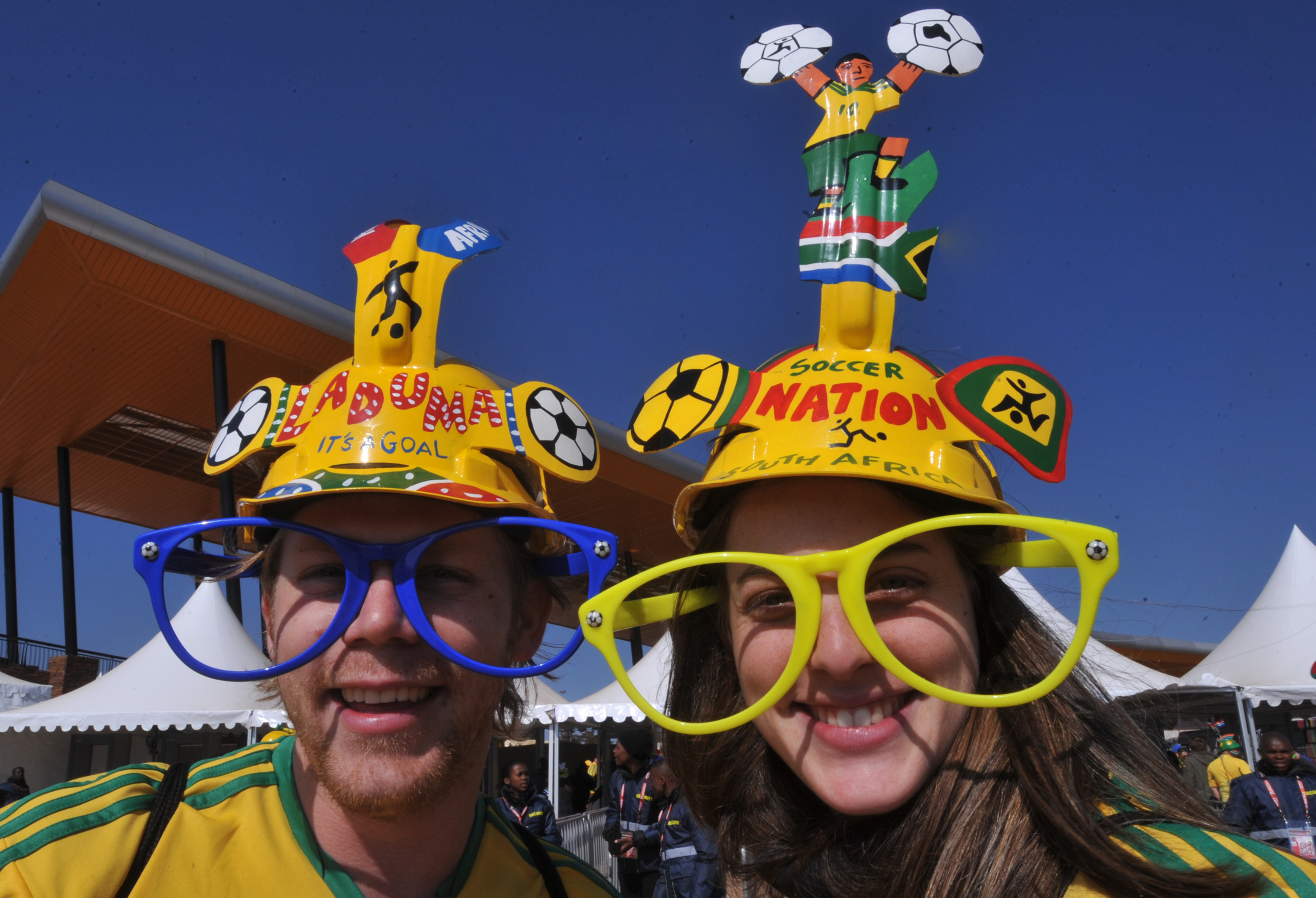 Torcedores de vários países lotam o Estádio Soccer City durante o jogo de abertura da Copa do Mundo. Fantasiados e usando camisas da África do Sul e do México, os torcedores fizeram uma festa enquanto se preparavam para entrar no estádio.